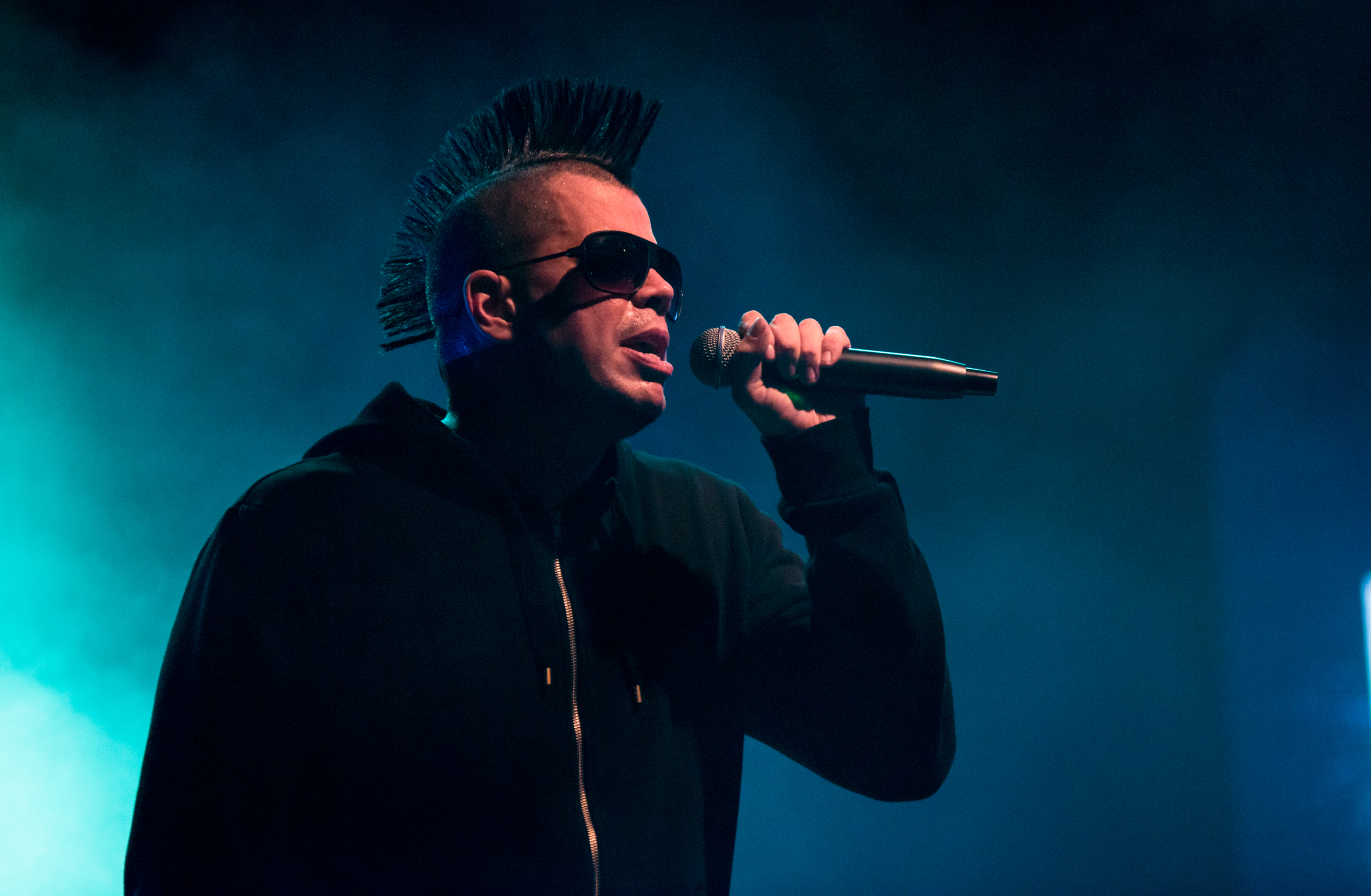 de Die Band Faderhead beim e-tropolis 2014 in Oberhausen